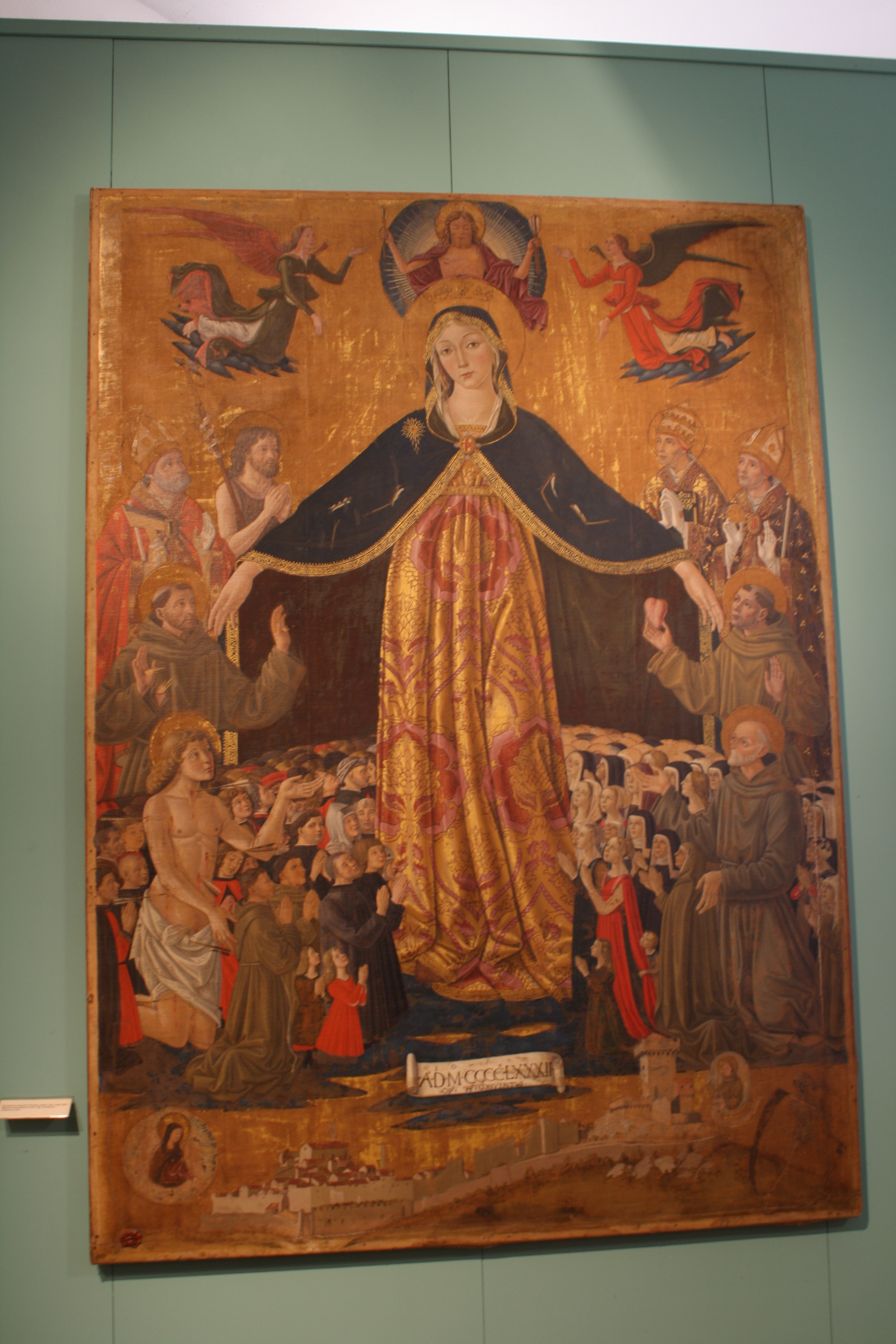 Madonna della Misericordia